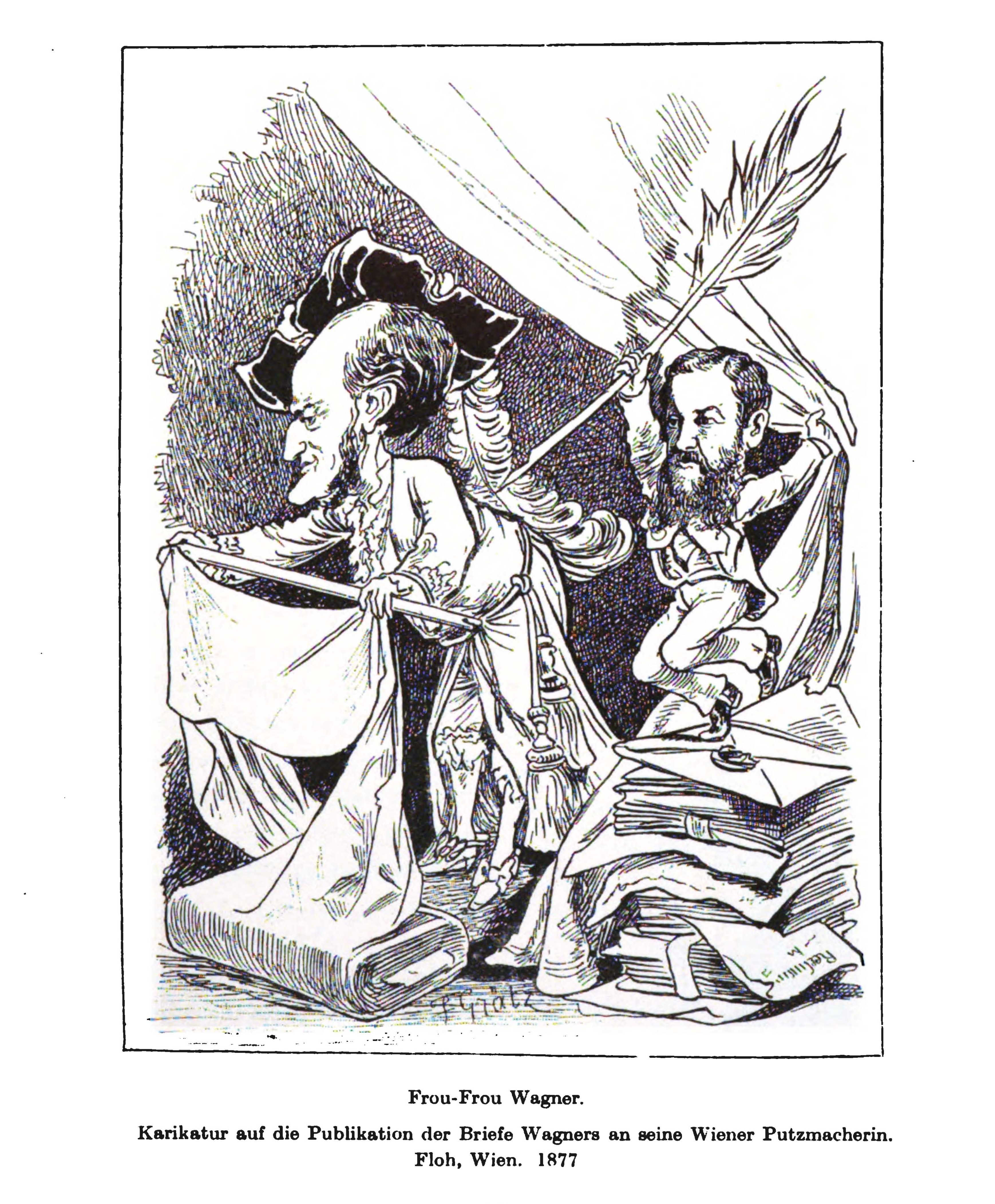 Frou-Frou Wagner. Karikatur auf die Publikation der Briefe Wagners an eine Putzmacherin (hg. von Daniel Spitzer). Rechts im Bild (mit der spitzen Feder): Daniel Spitzer